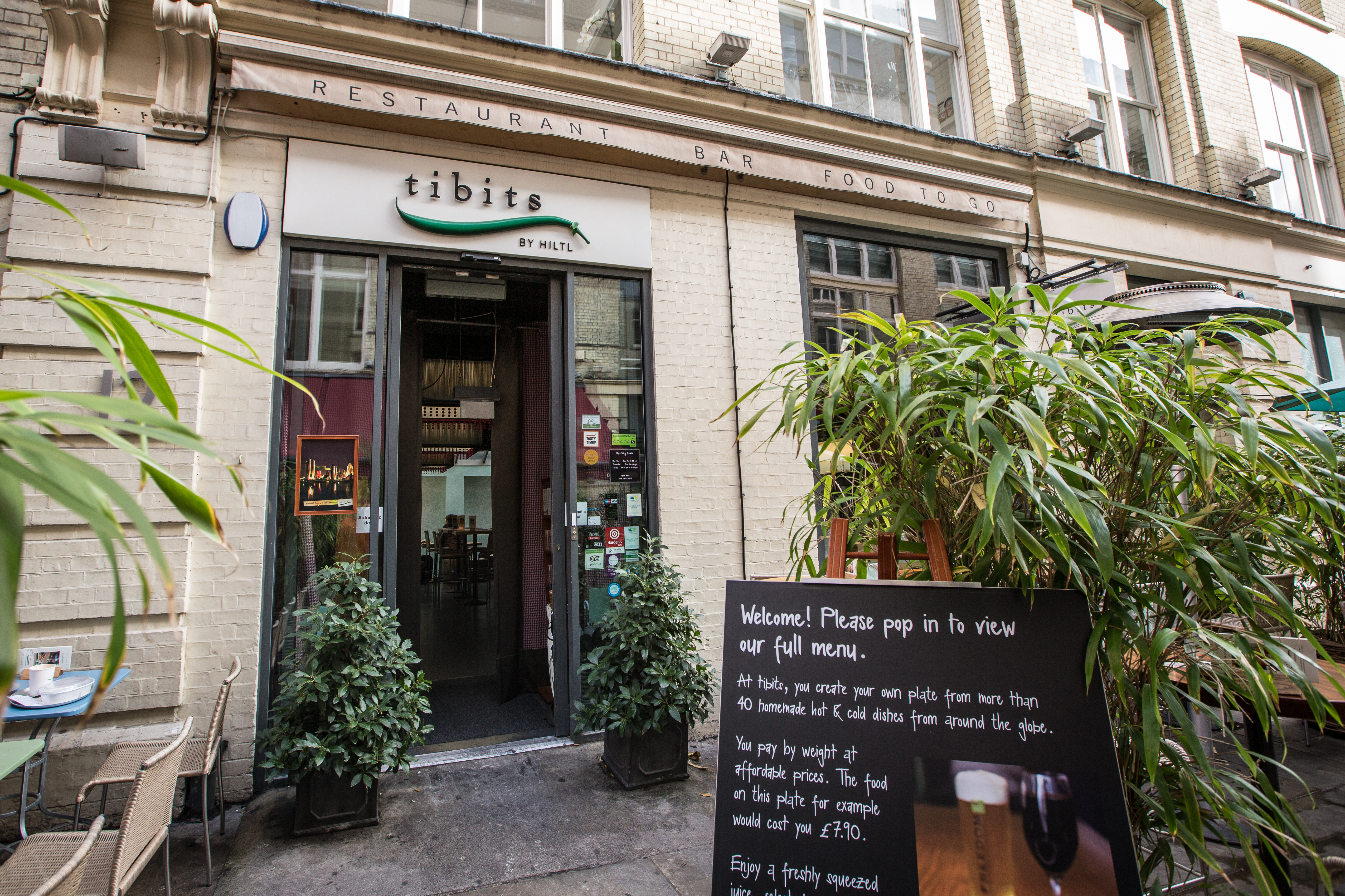 Tibits Restaurant, London